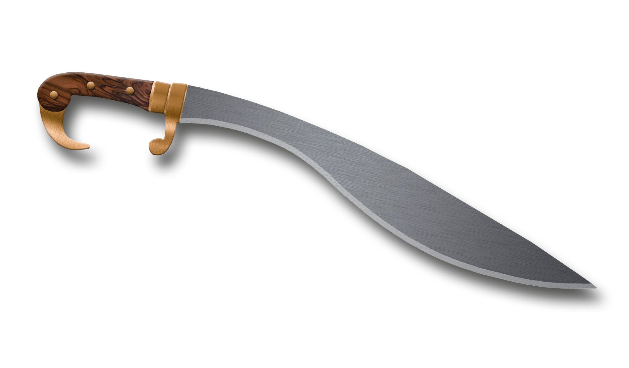 Illustration einer Kopis (antikes, griechisches Hiebschwert)